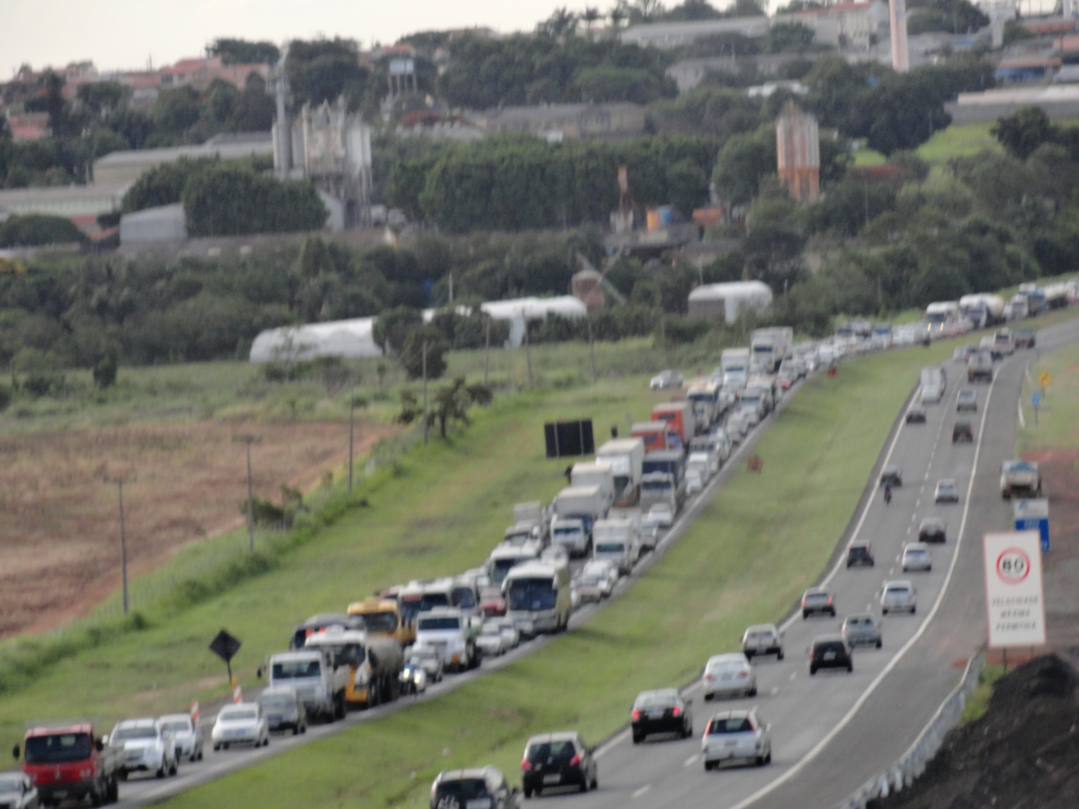 Congestionamento no Tapetão.